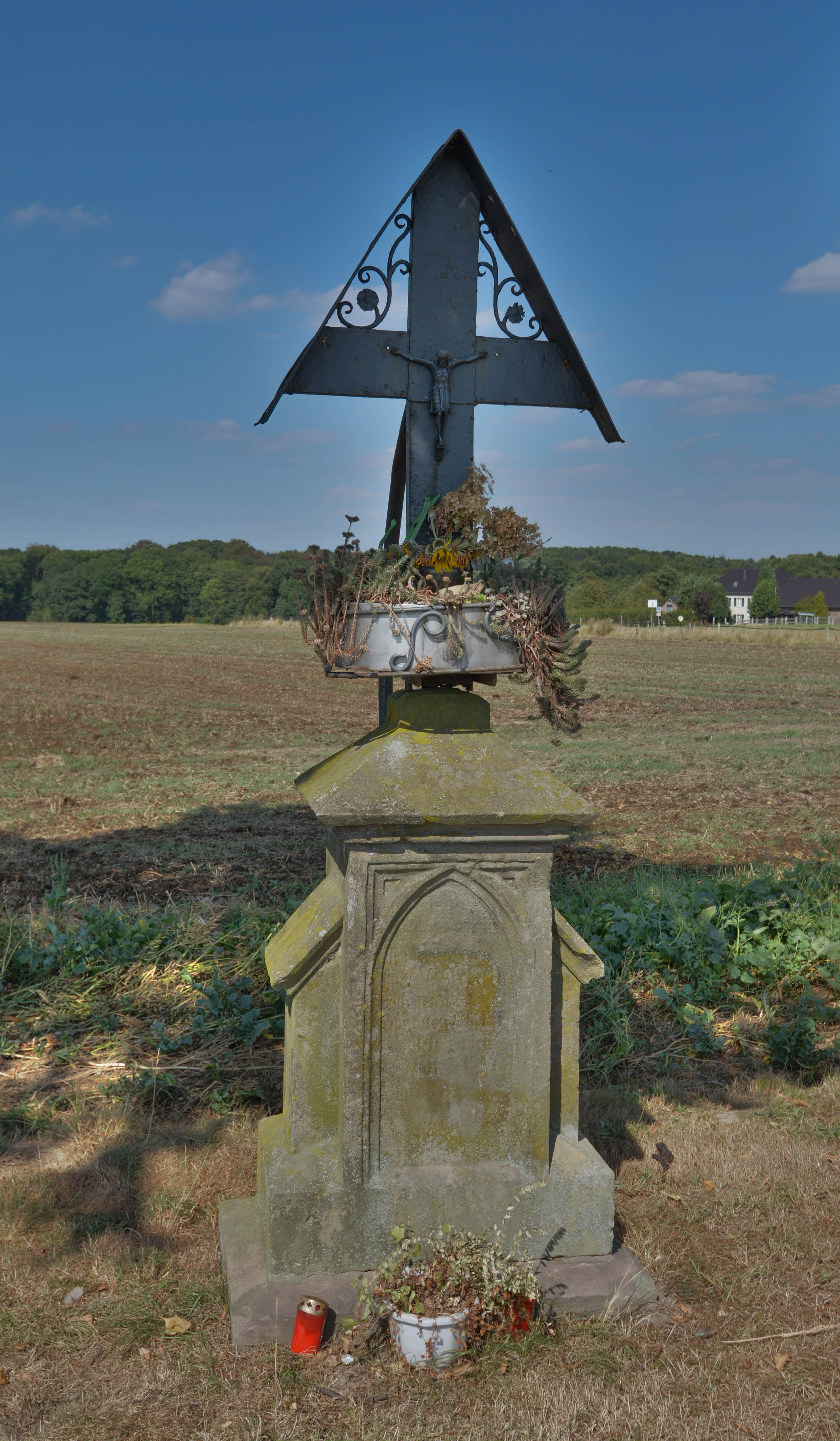 Wegekreuz Dückeburg an der Alte SchulstrasseThis is a photograph of an architectural monument., no. B 013